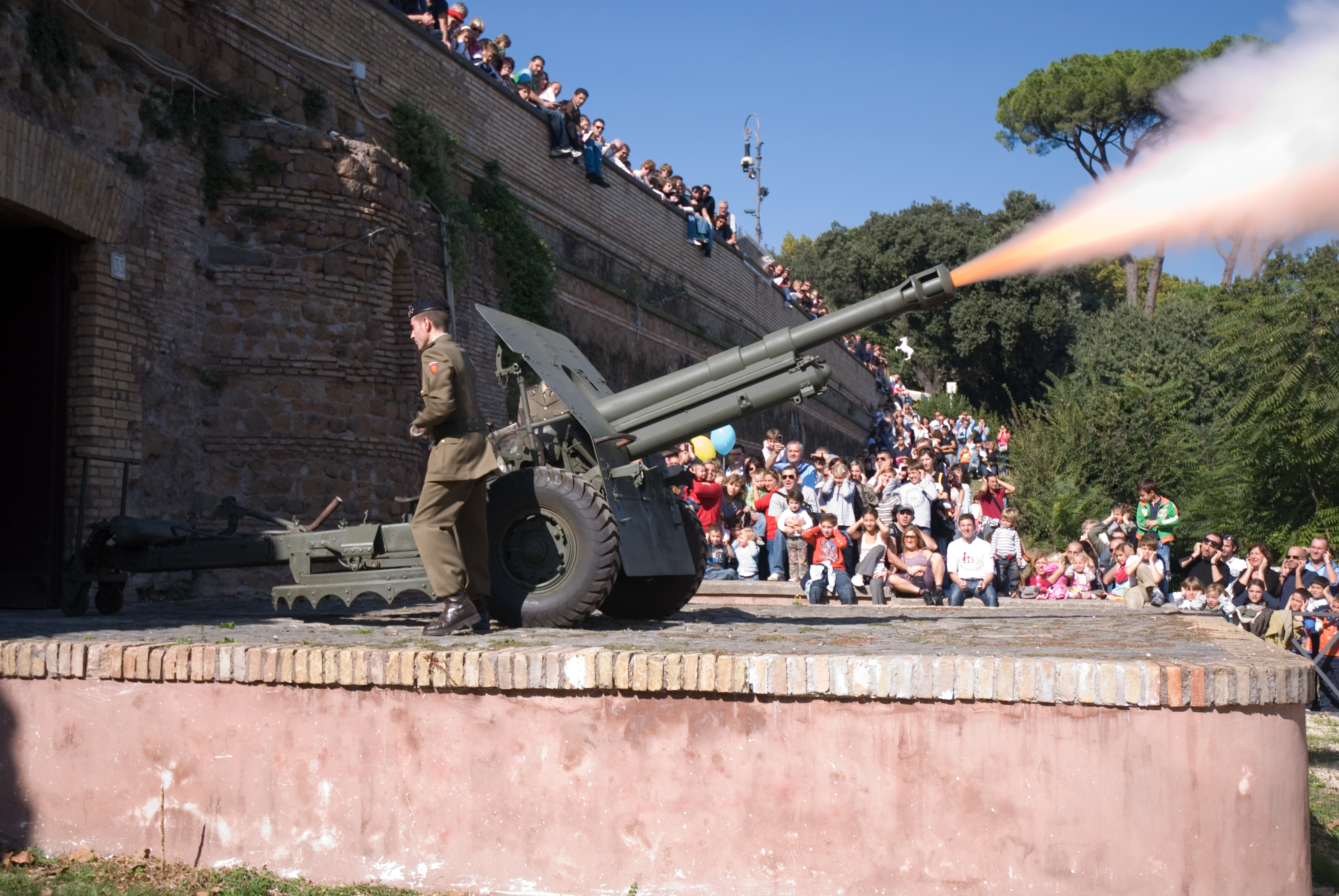 Giulio Longhi, sparo del cannone del Gianicolo a mezzogiorno